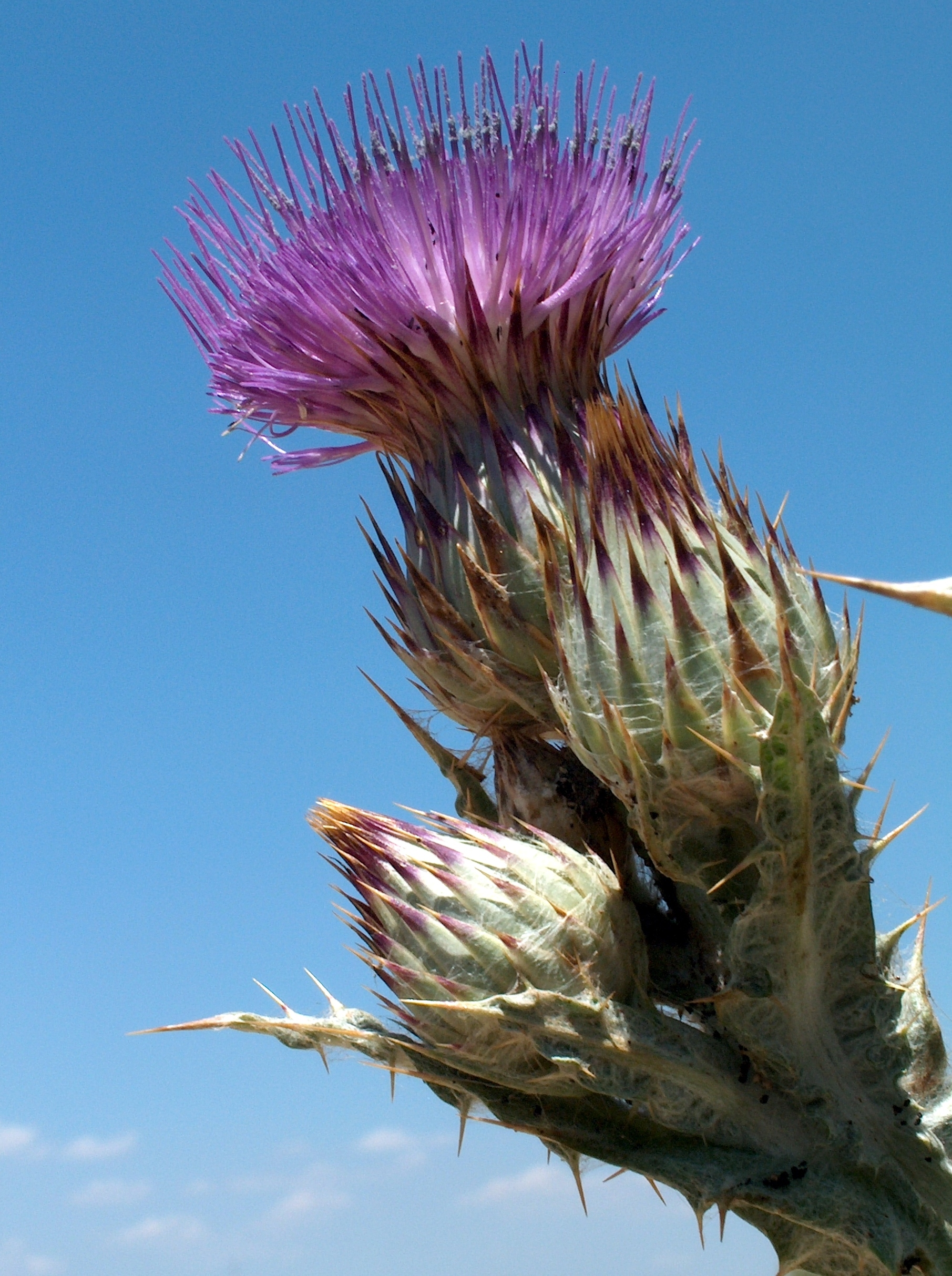 Onopordum nervosum (Cardo borriquero) : Capítulo en plena antesis y otros en preantesis - Los Estanques del Arroyo de Rejas, Madrid-Barajas (España).